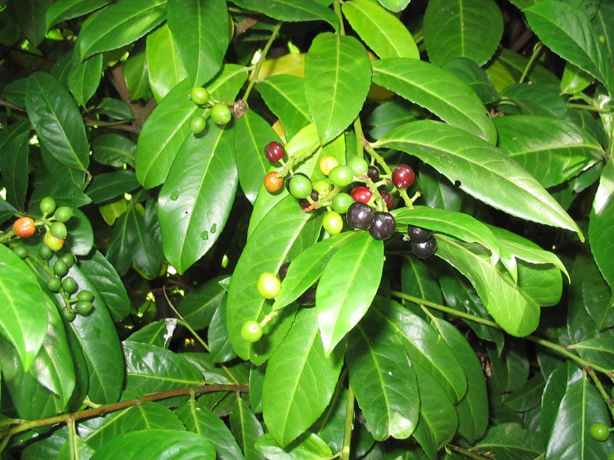 Laurierkers met bessen. Zelfgemaakte foto.